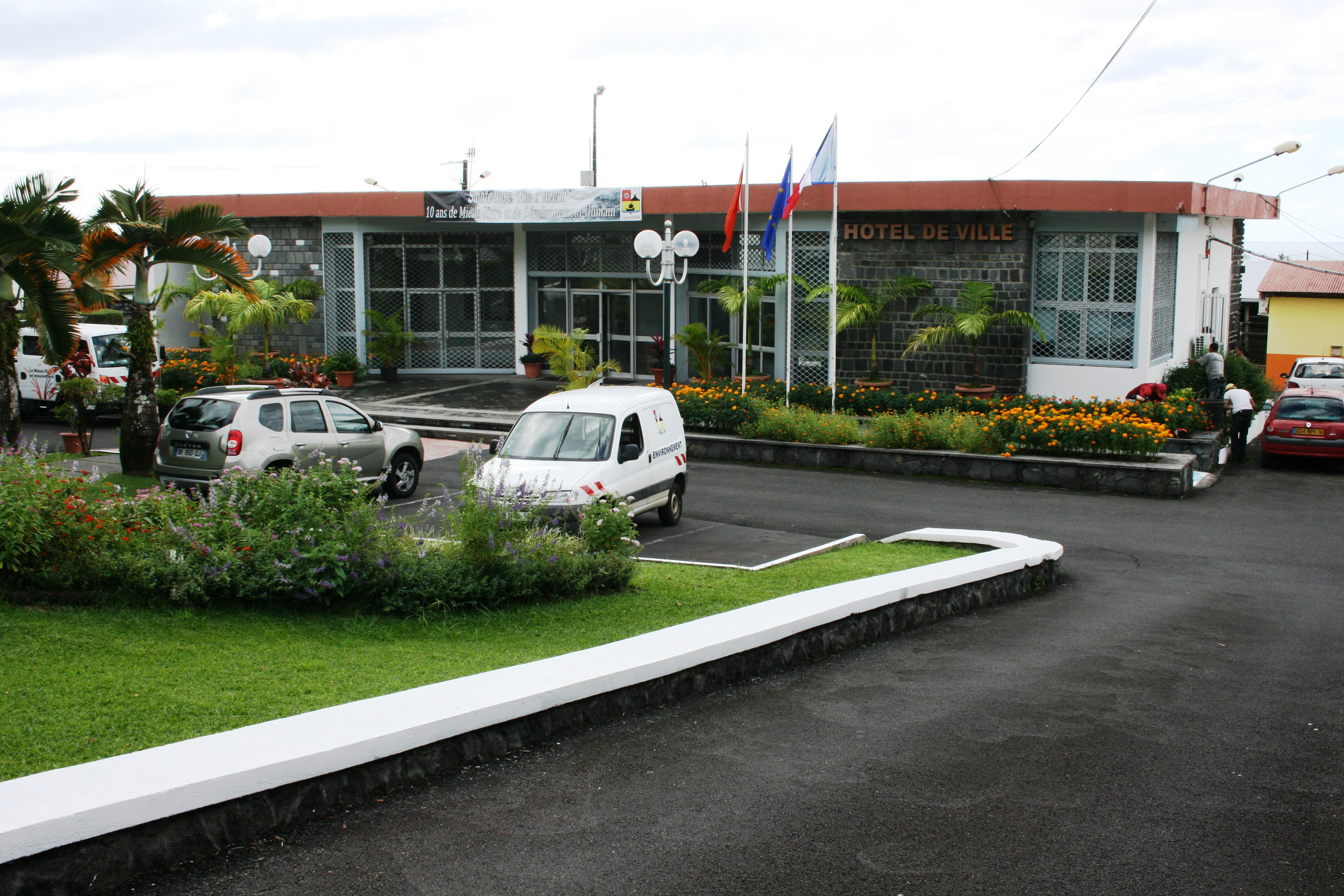 Vue de l'hôtel de ville de Sainte-Rose de La Réunion.